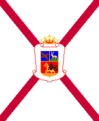 Bandera de Oñati, en Gipuzkoa (España)